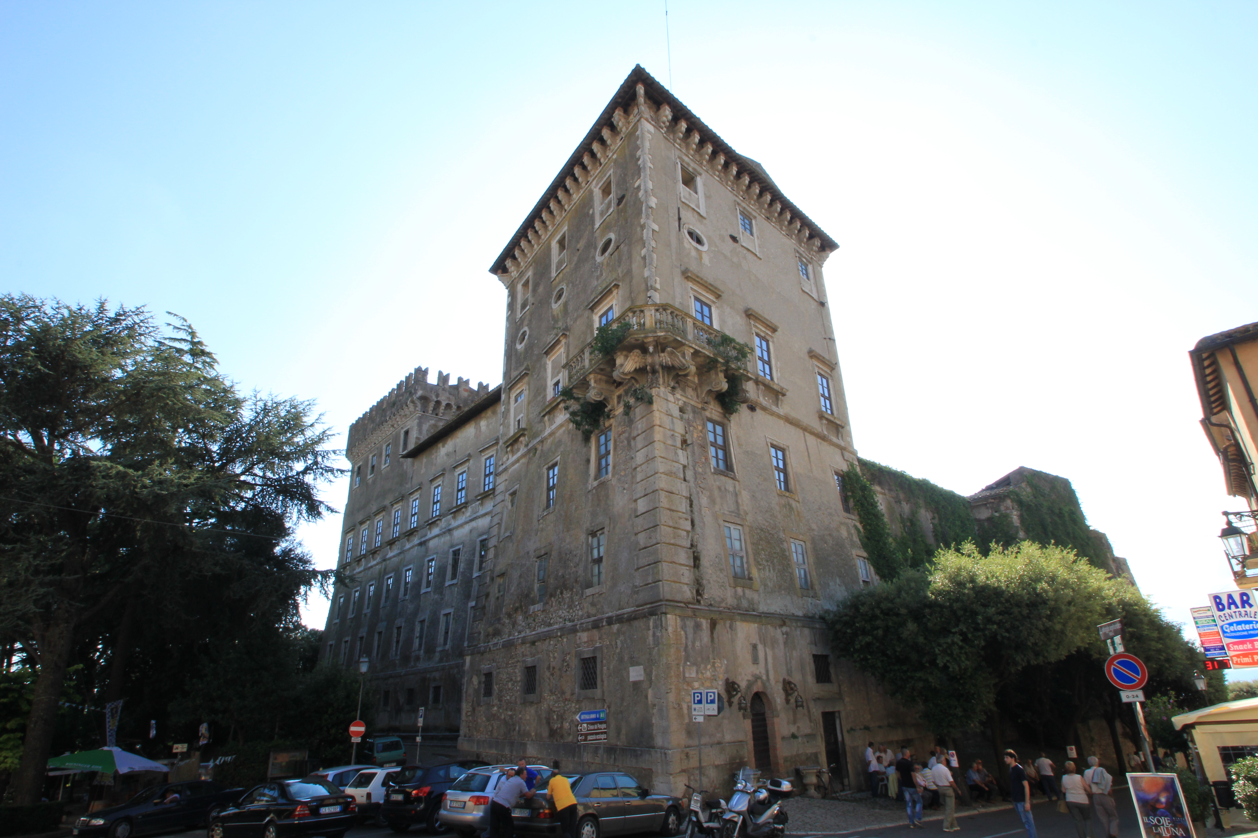 Castello di Giove, in provincia di Terni, Umbria, Italia.